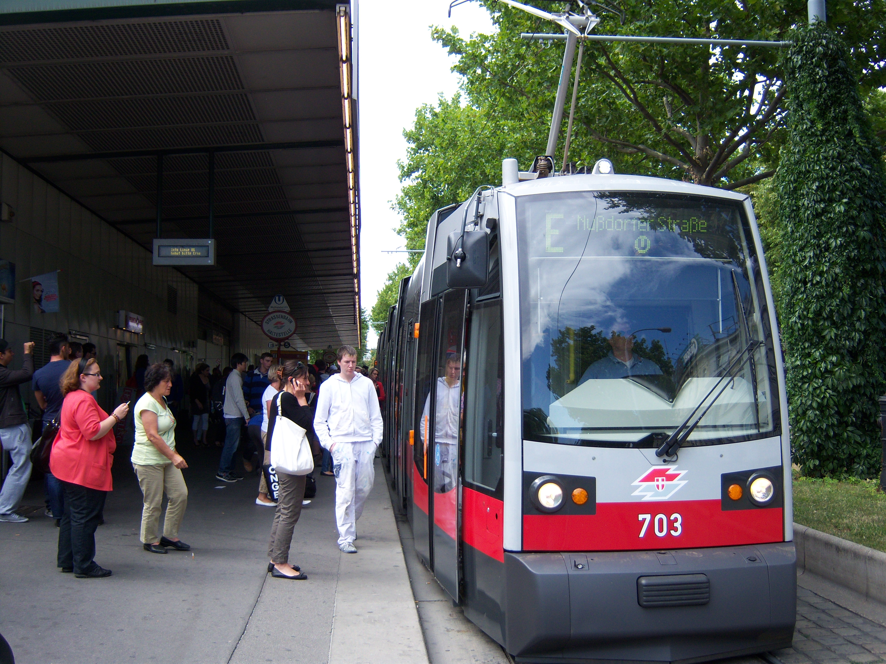 Sonderlinie E als Ersatzverkehr für die Linie U6 an der Haltestelle Westbahnhof